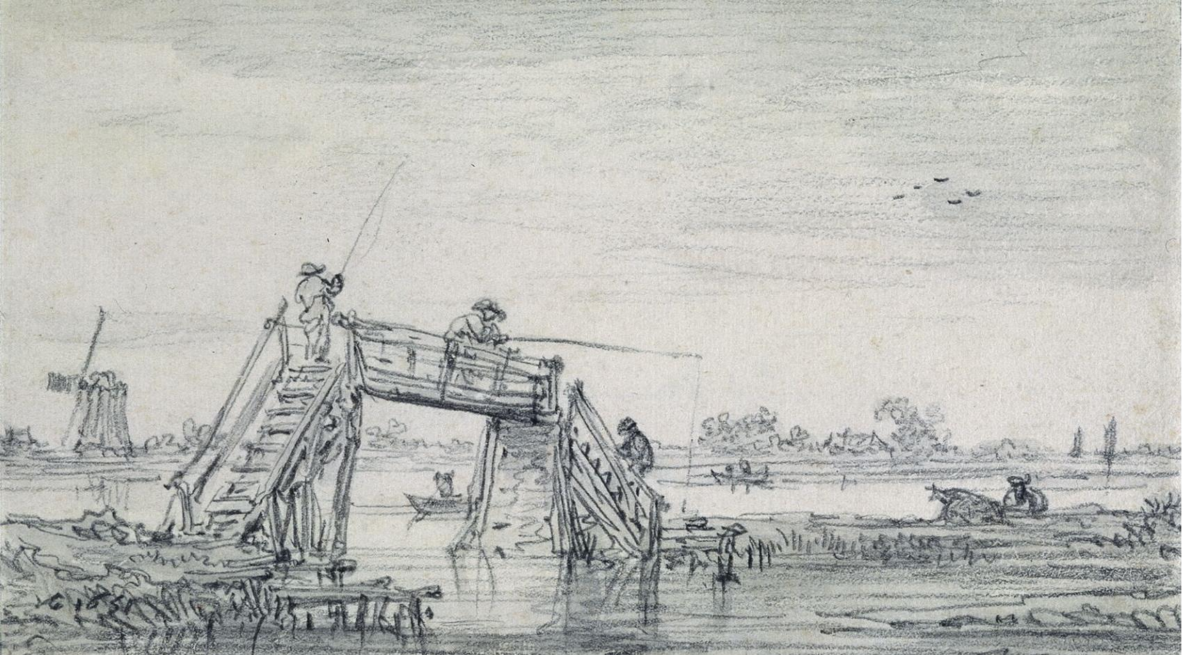 Footbridge with anglers. Alternative title(s): Voetbrug met vissers. Landschap met een hoge brug.